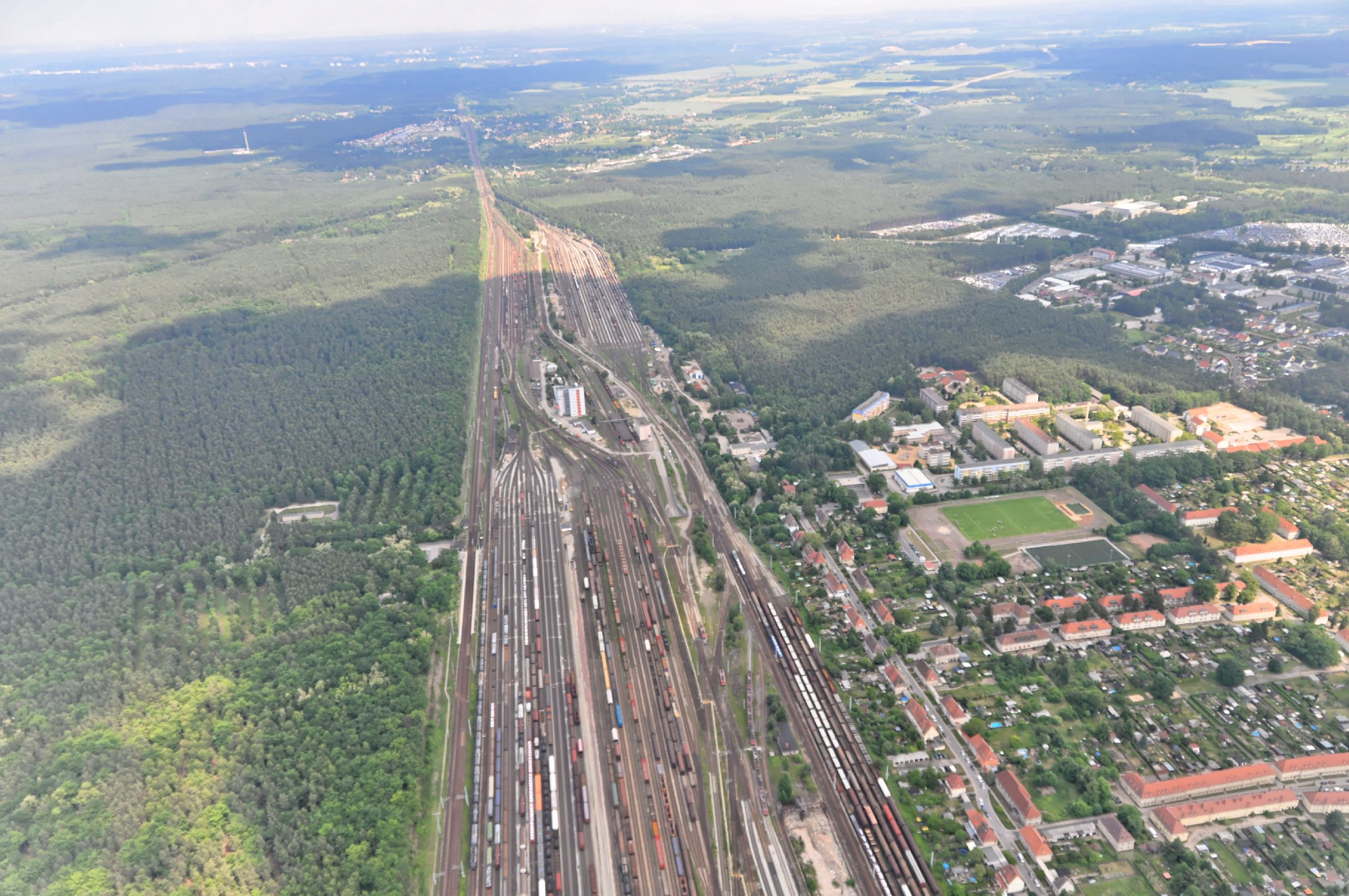 Überführungsflug vom Flugplatz Schwarzheide-Schipkau über Potsdam, Lüneburg zum Flugplatz Nordholz-Spieka Blick auf den Rangierbahnhof Seddin, die Strecke führt in Blickrichtung Berlin. Rechts neben den Gleisen die Eisenbahnersiedlung Neuseddin.